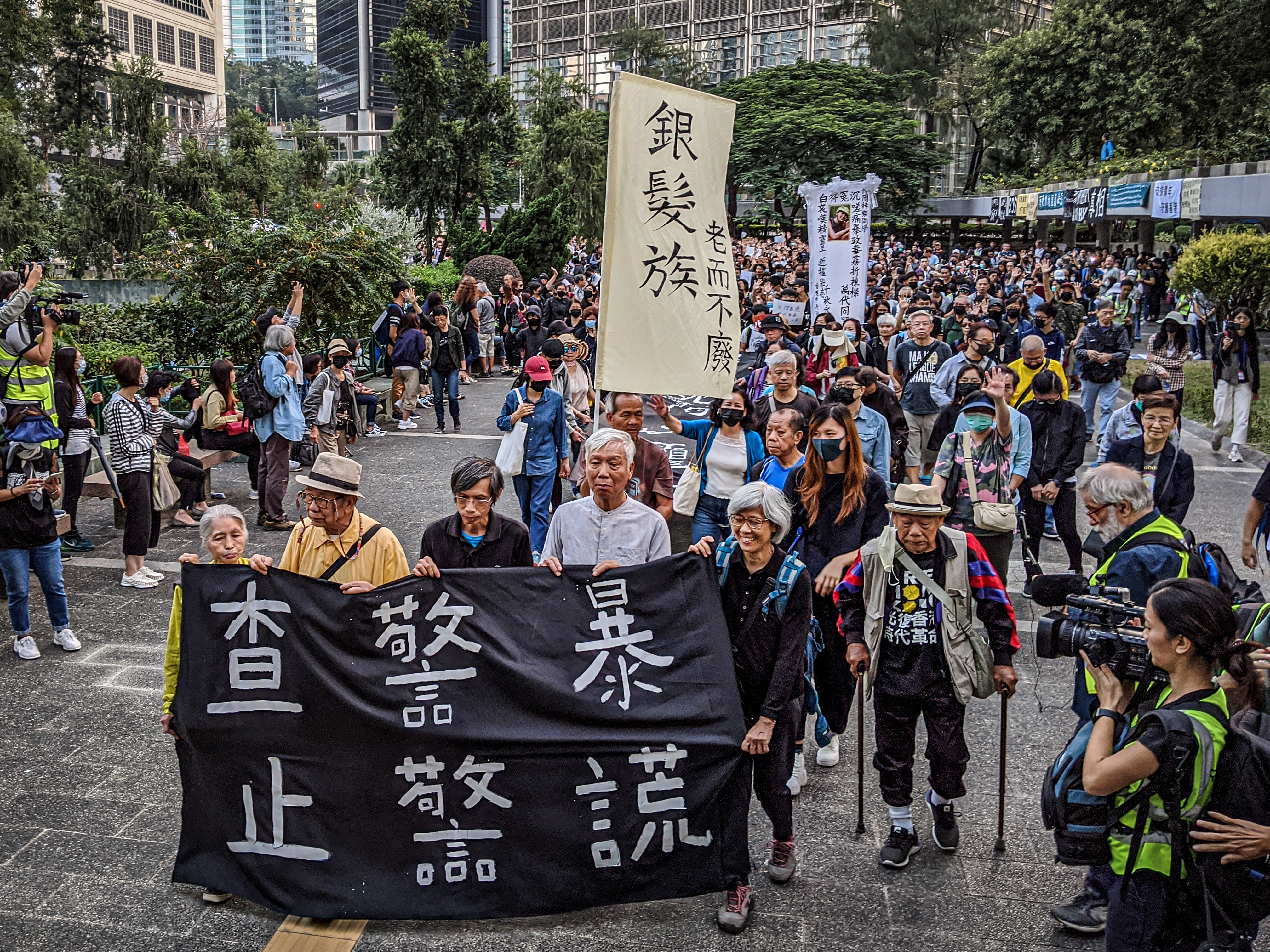 IMG_20191115_171054